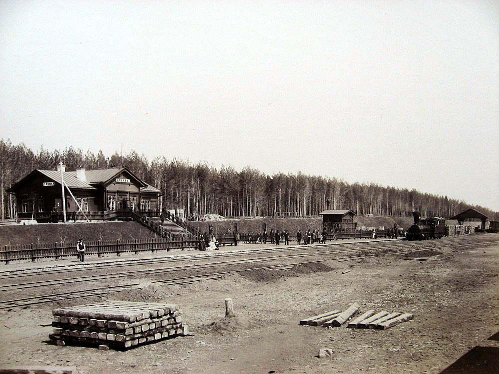 Станция Заимка в Перми, на 5 версте